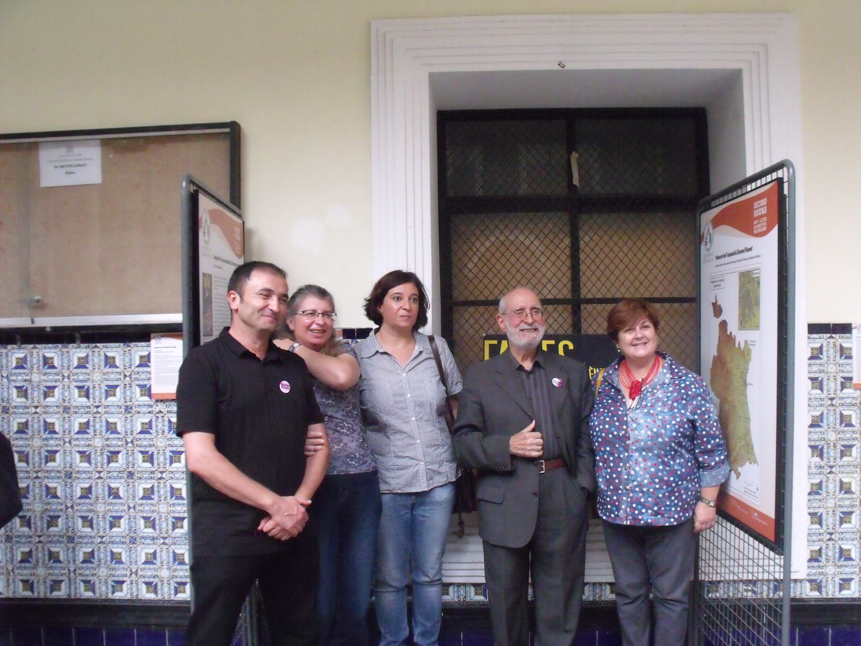 Foto de grupo ante el panel del IES Juan de Garay de Valencia. De izquierda a derecha: Ricardo Huerta, comisario de la exposición; jefa del departamento de dibujo del IES Juan de Garay, Aurora Moreno y una profesora del centro; Roman de la Calle, catedrático de Estética y Teoría de las Artes de la Universitat de València y Presidente de la Real Academia de Bellas Artes de San Carlos y Fina Pons, Jefa de Estudios del IES Juan de Garay de Valencia.